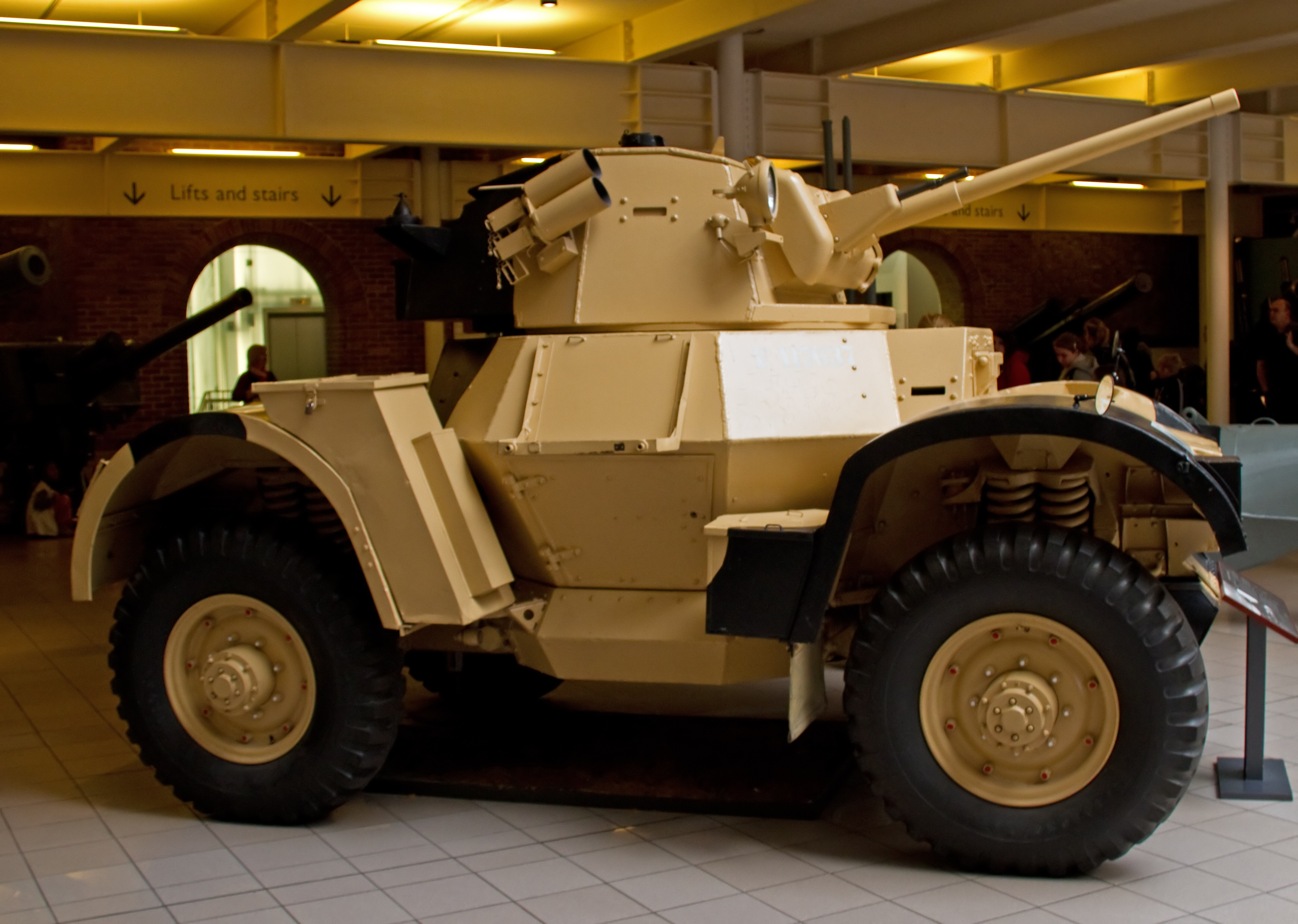 Daimler Mk1 Armoured Car side